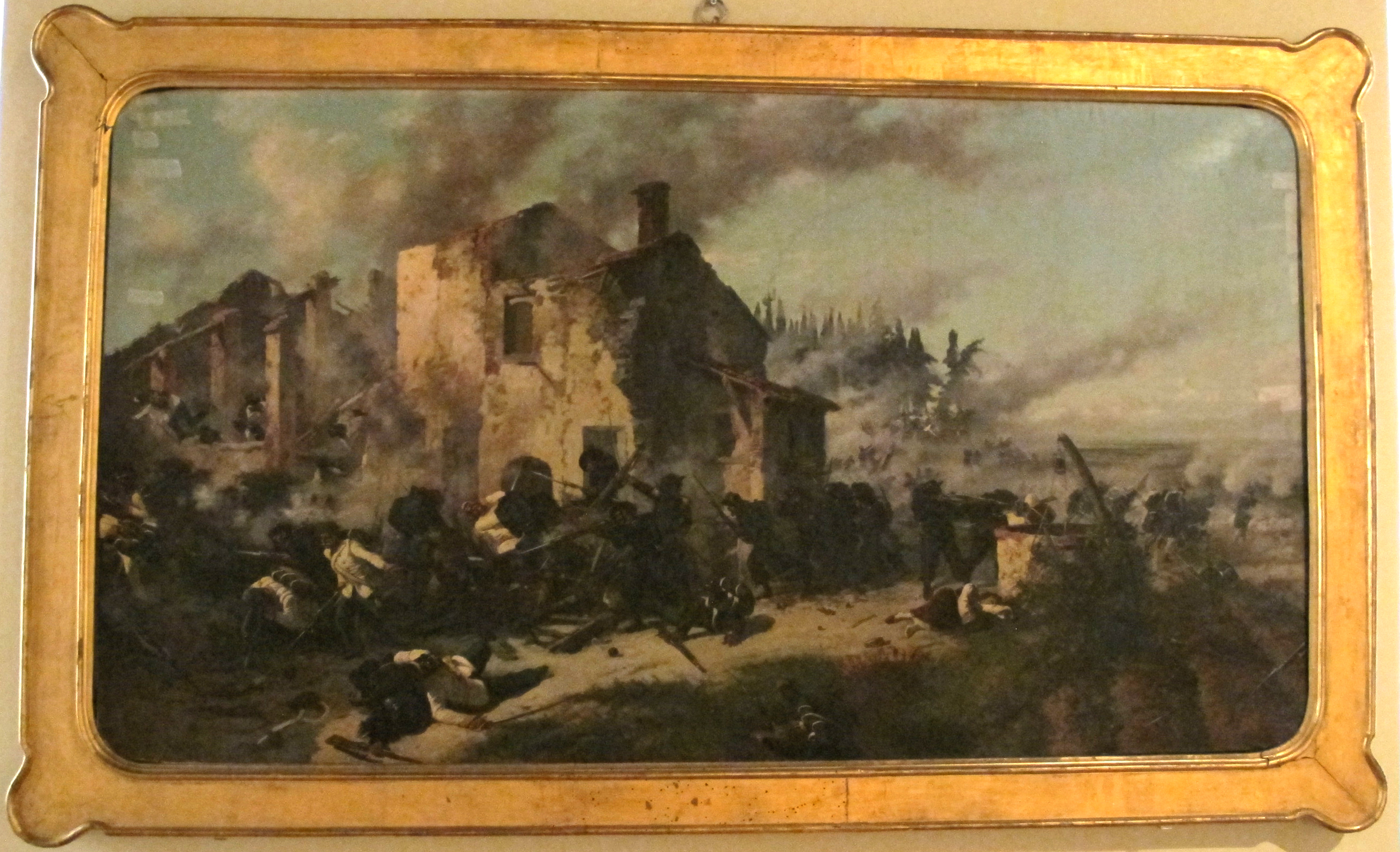 Museo Nazionale d'Arte Medievale e Moderna - MIBAC This is a photo of a monument which is part of cultural heritage of Italy.